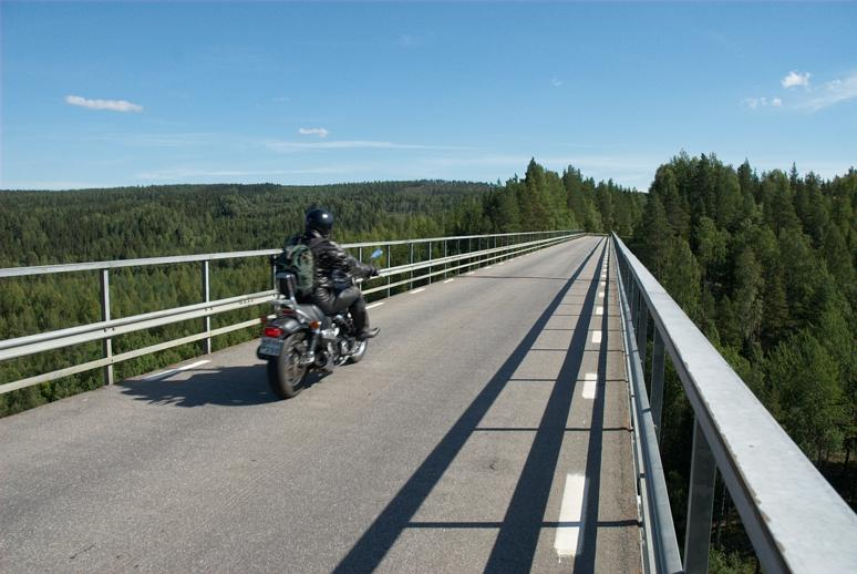 Första bron. Landsvägsbro. Byggdes 1891 och är en stålfackverksbro i fyra spann - alla olika långa - med hängande parabelfackverk och med en total spännvidd av 164 meter.; Bro; Byggnadsverk; Kommunikationsväsen